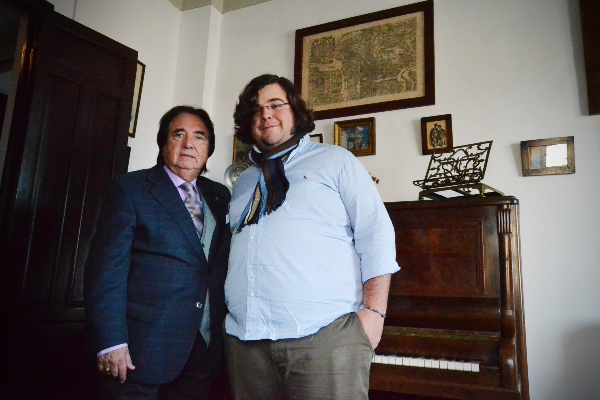 Ambrosio Valero junto a Enrique García Asensio en la Casa Museo Manuel de Falla de Granada, España.